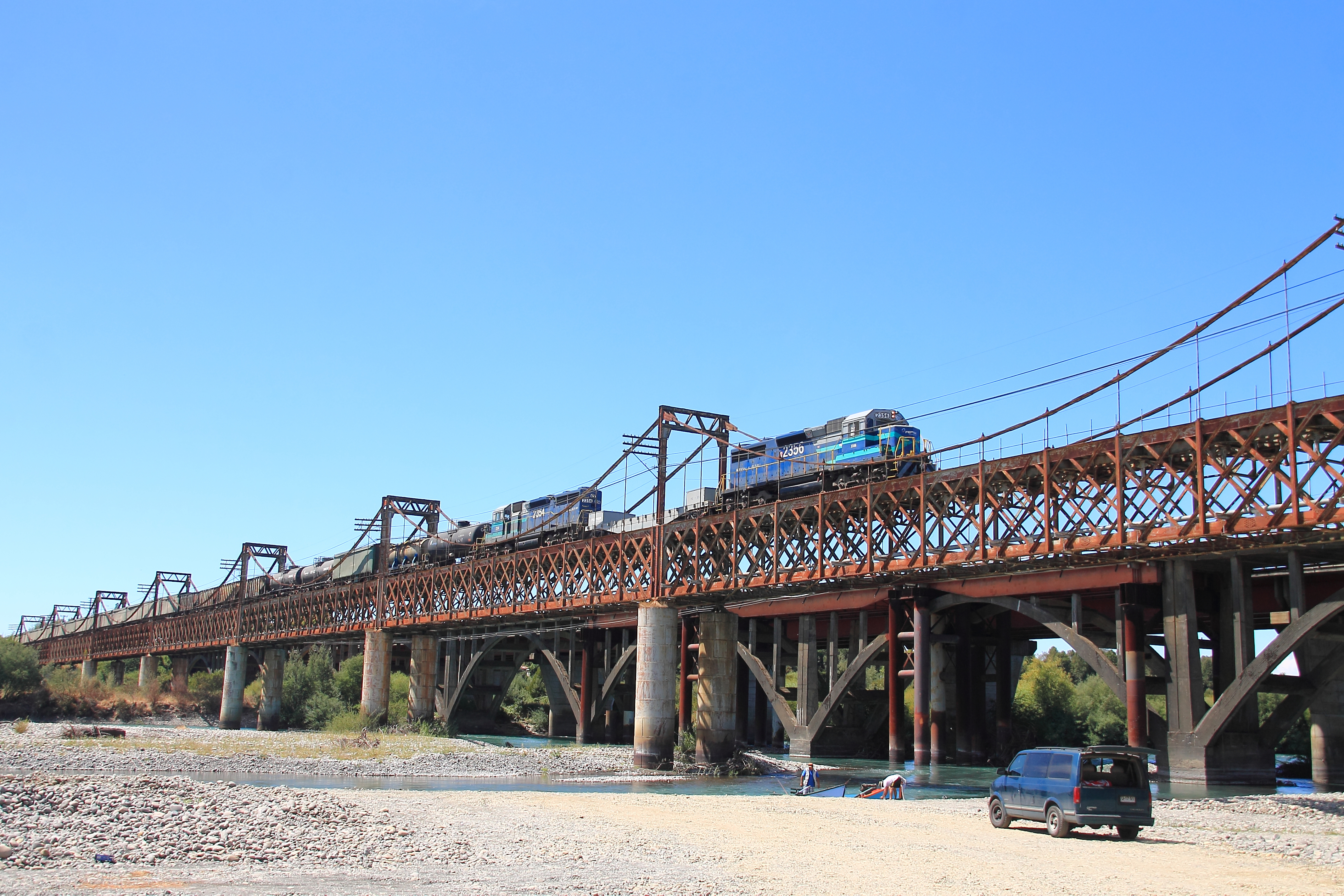 Una pequeña dosis de cargueros no es mala después de tanto ver trenes de pasajeros :) Tren, "el mariquina" o 50083 rumbo a la planta de Mariquina al mando de las SD39 2M 2356-2354 por el viejo e imponente puente sobre el Rio Tolten, en la localidad de Pitrufquen.